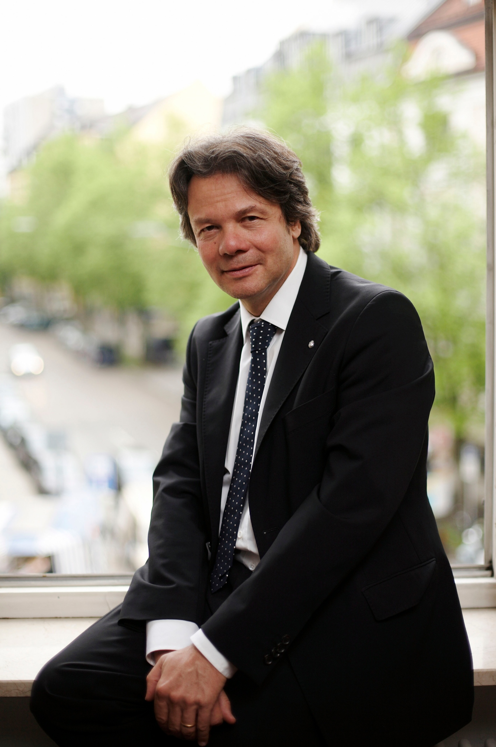 Michael Käfer, Geschäftsführer von Feinkost Käfer, im Stammhaus in der Prinzregentenstraße in München